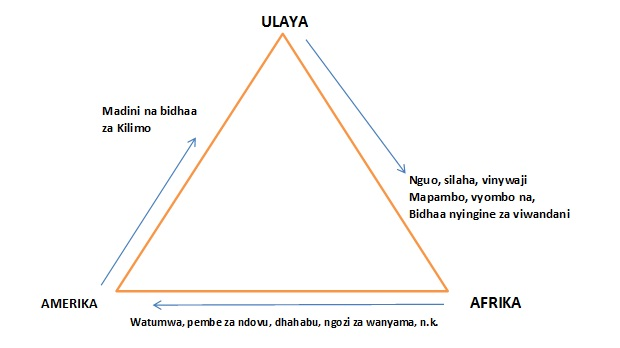 Kiswahili: Mfano wa mchoro wa Biashara ya Utumwa ya Pembetatu.